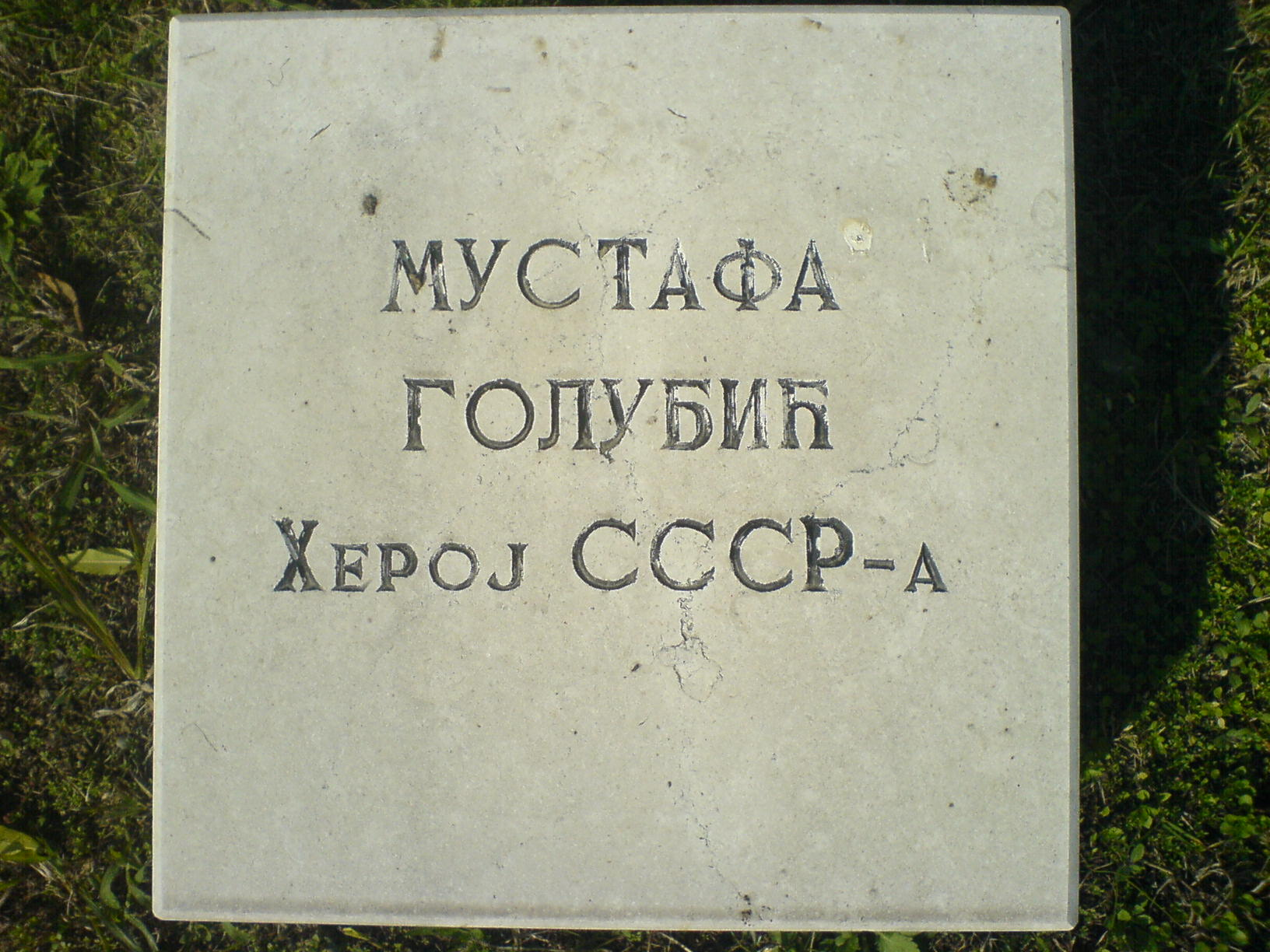 Spomen ploča Mustafe Golubića u Aleji boraca NOR-a na Novom groblju u Beogradu.